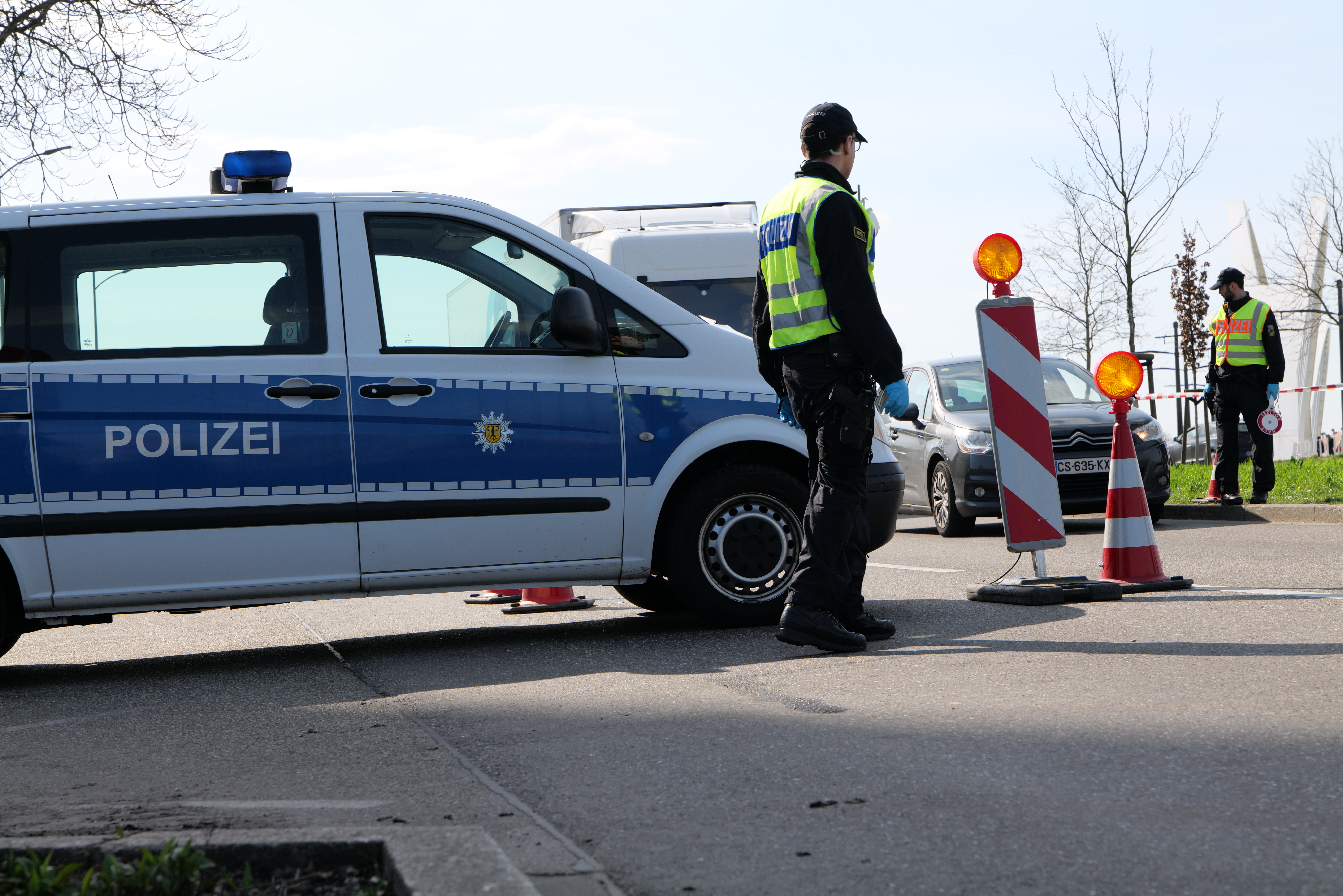 Grenzkontrollen von Ankommenden auf der deutschen Seite der Europabrücke zwischen Straßburg und Kehl am 16. März 2020.